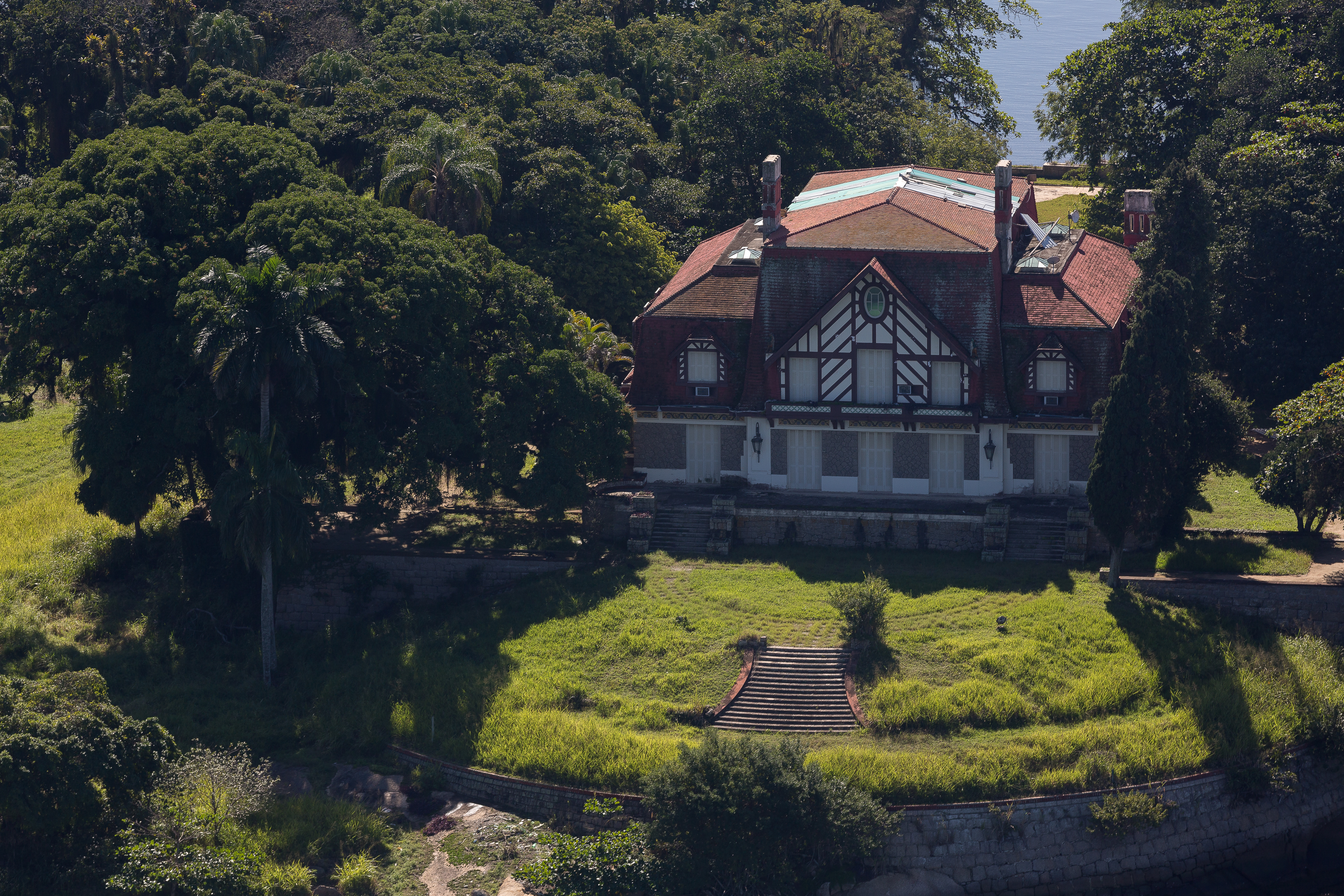 Vista aérea da Ilha do Brocoió, arquipélago da Ilha de Paquetá.